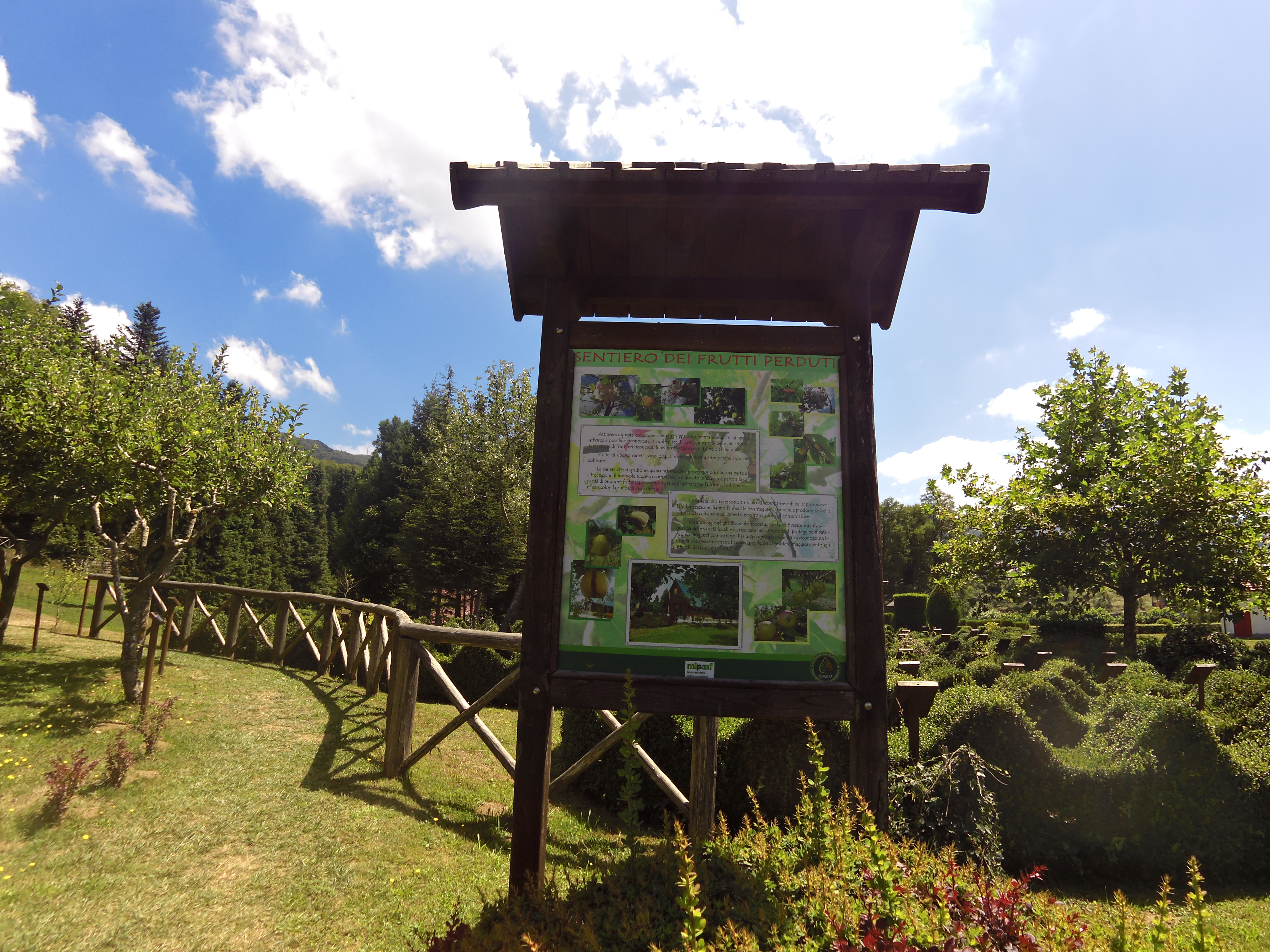 Insegna del Sentiero dei frutti perduti a Villa Vittoria Mongiana